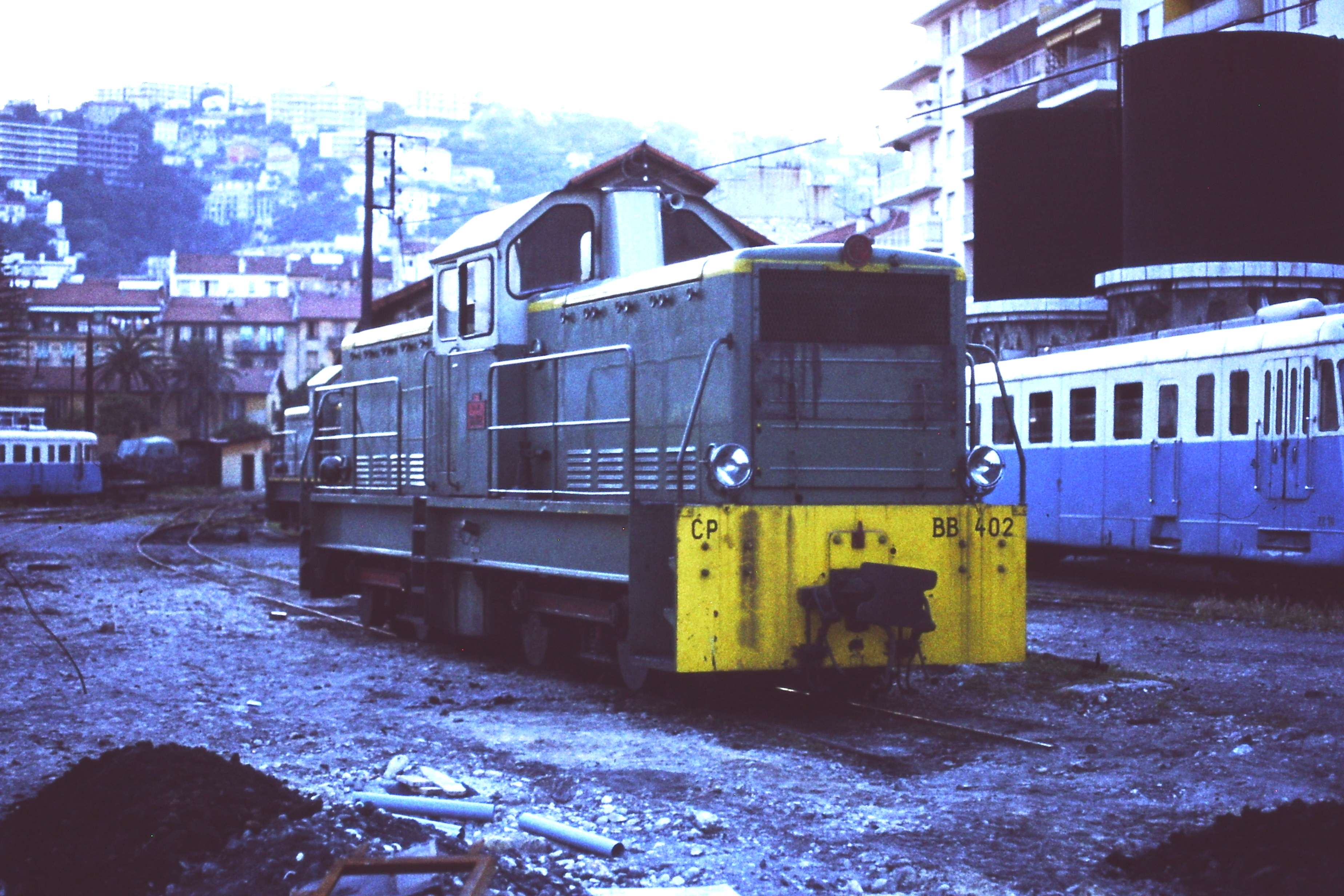 Chemins de fer de Provence (CP) locomotief BB402 van het type Brissonneau et Lotz (BL) te Nice Gare du Sud.